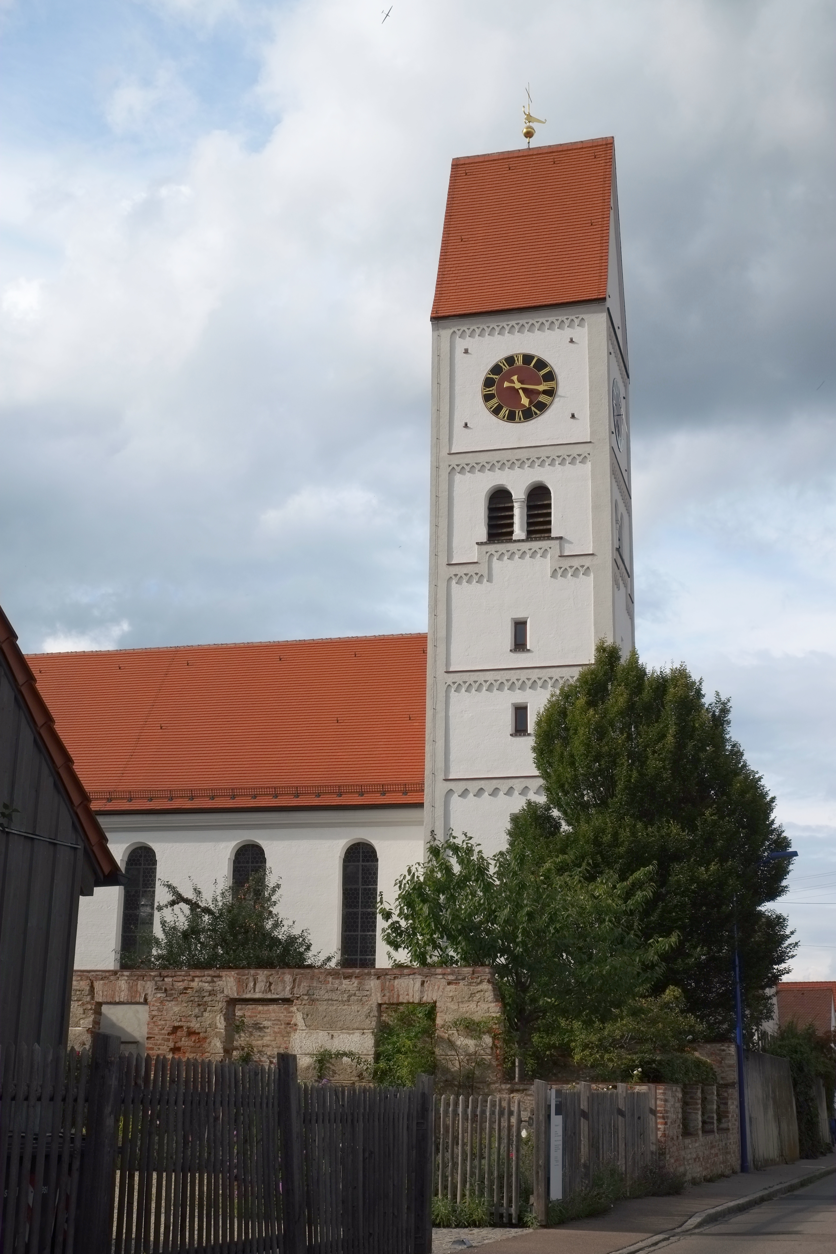 Katholische Pfarrkirche St. Nikolaus in Stadtbergen im Landkreis Augsburg (Bayern, Deutschland)